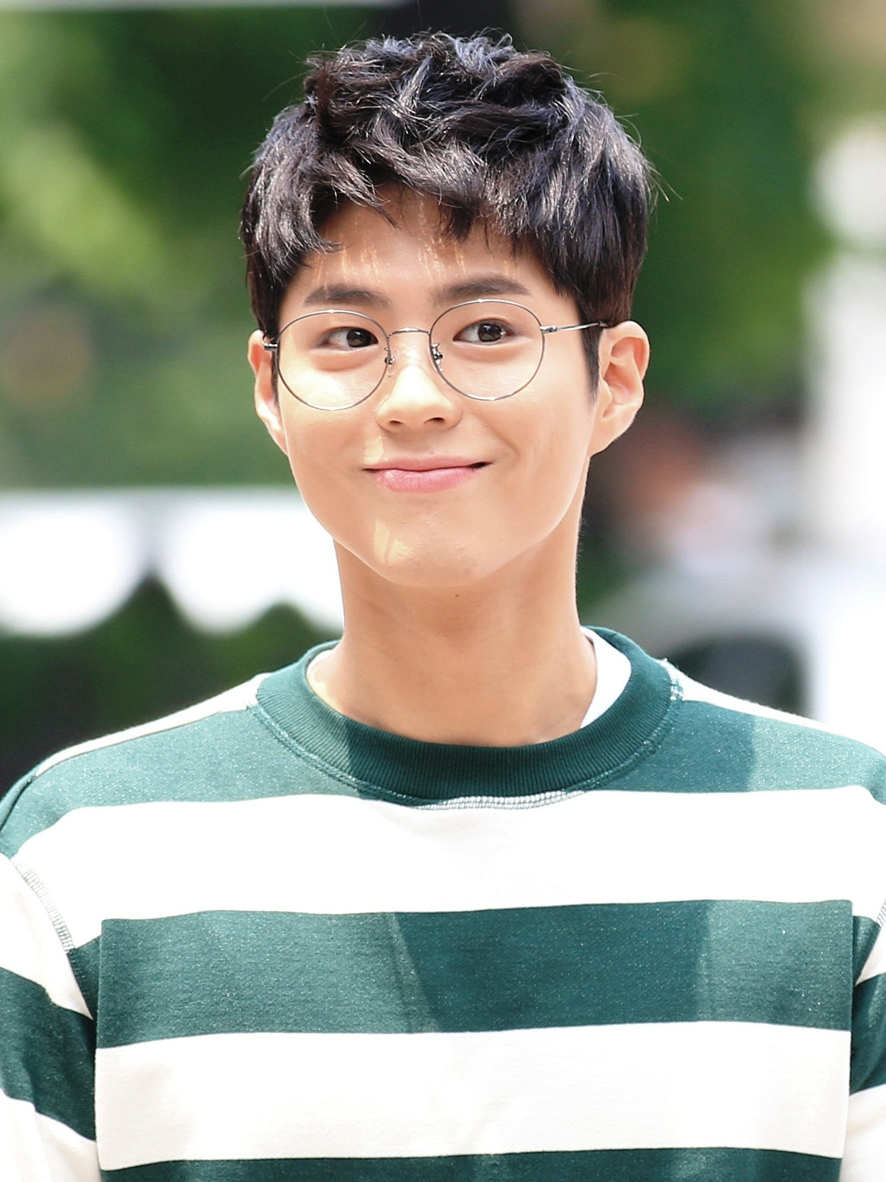 160610 박보검 뮤직뱅크 출근